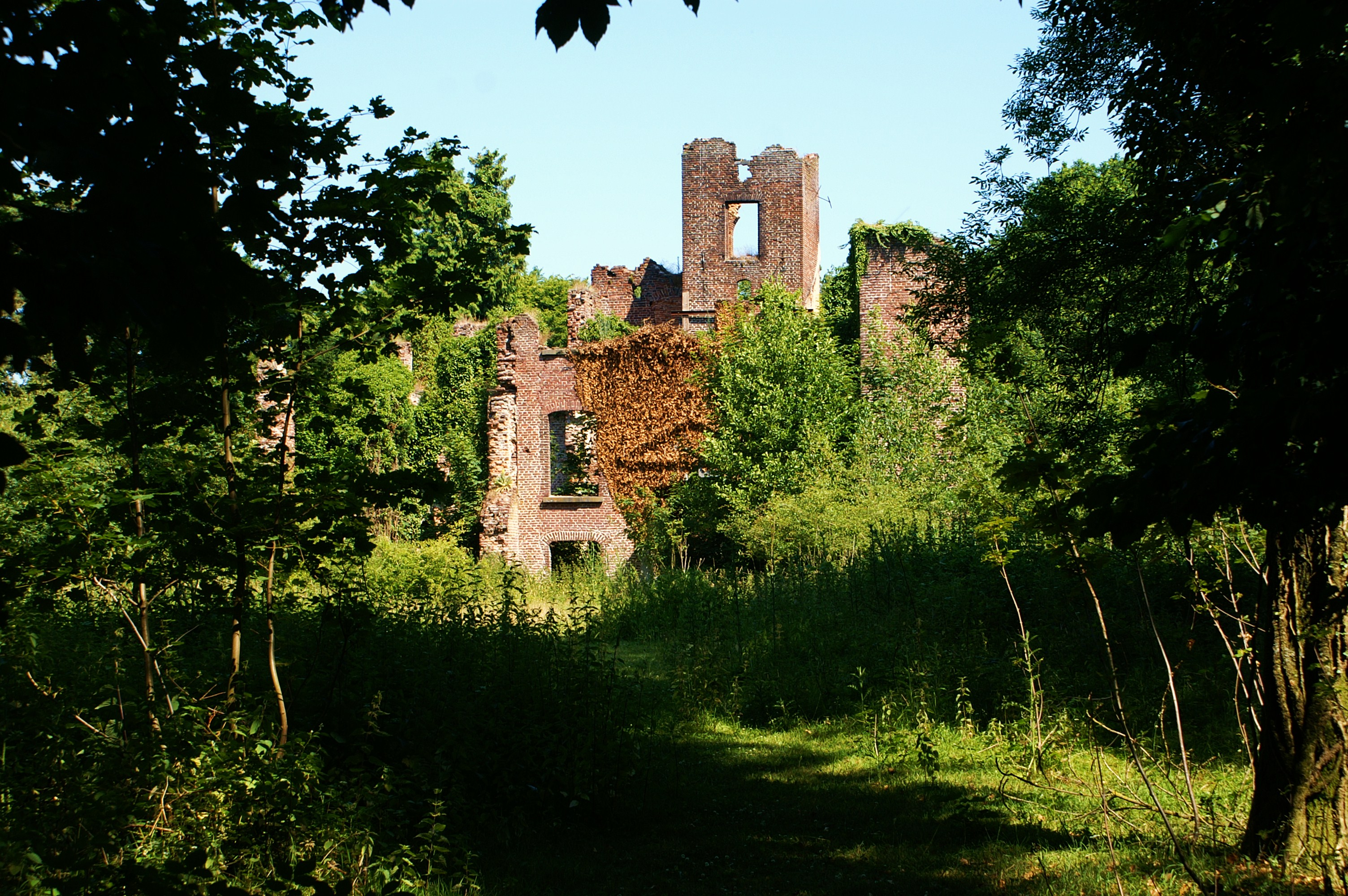 Ruine van kasteel Bleijenbeek te Afferden.